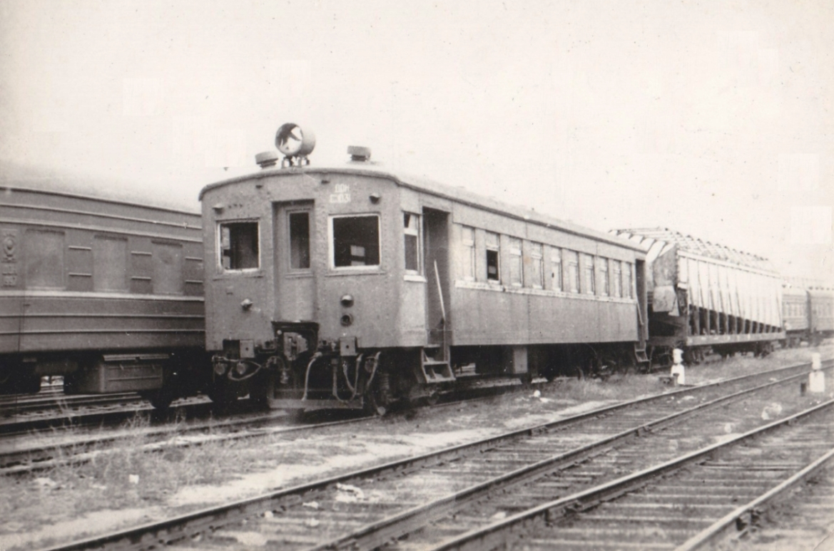 Моторный вагон Сд-031 работал в ТЧ Москва-III Северной ж. д, затем передан в ТЧ Панки Московско-Рязанской (с 1959 Московской) В 1970 г. со Свердловской ж. д. передан в промышленность.